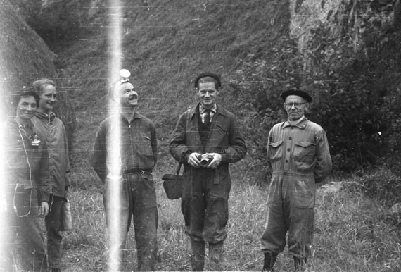 Altxerriko kobazuloaren kanpo aldean. Eskuinetik hasita, lehenengoa Jose Miguel Barandiaran, bigarrena André Leroi-Gourhan.